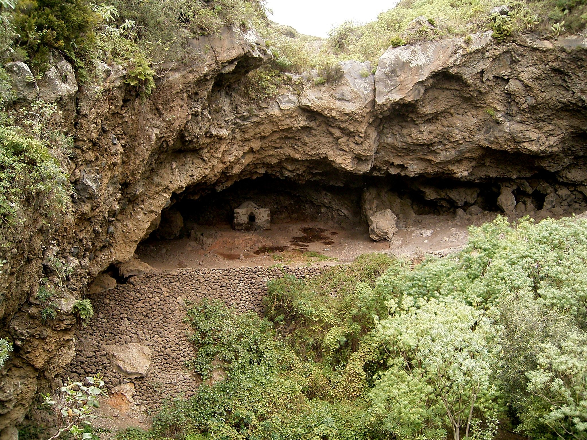 Parque Arqueológico Belmaco in Villa de Mazo, La Palma, Canary Islands